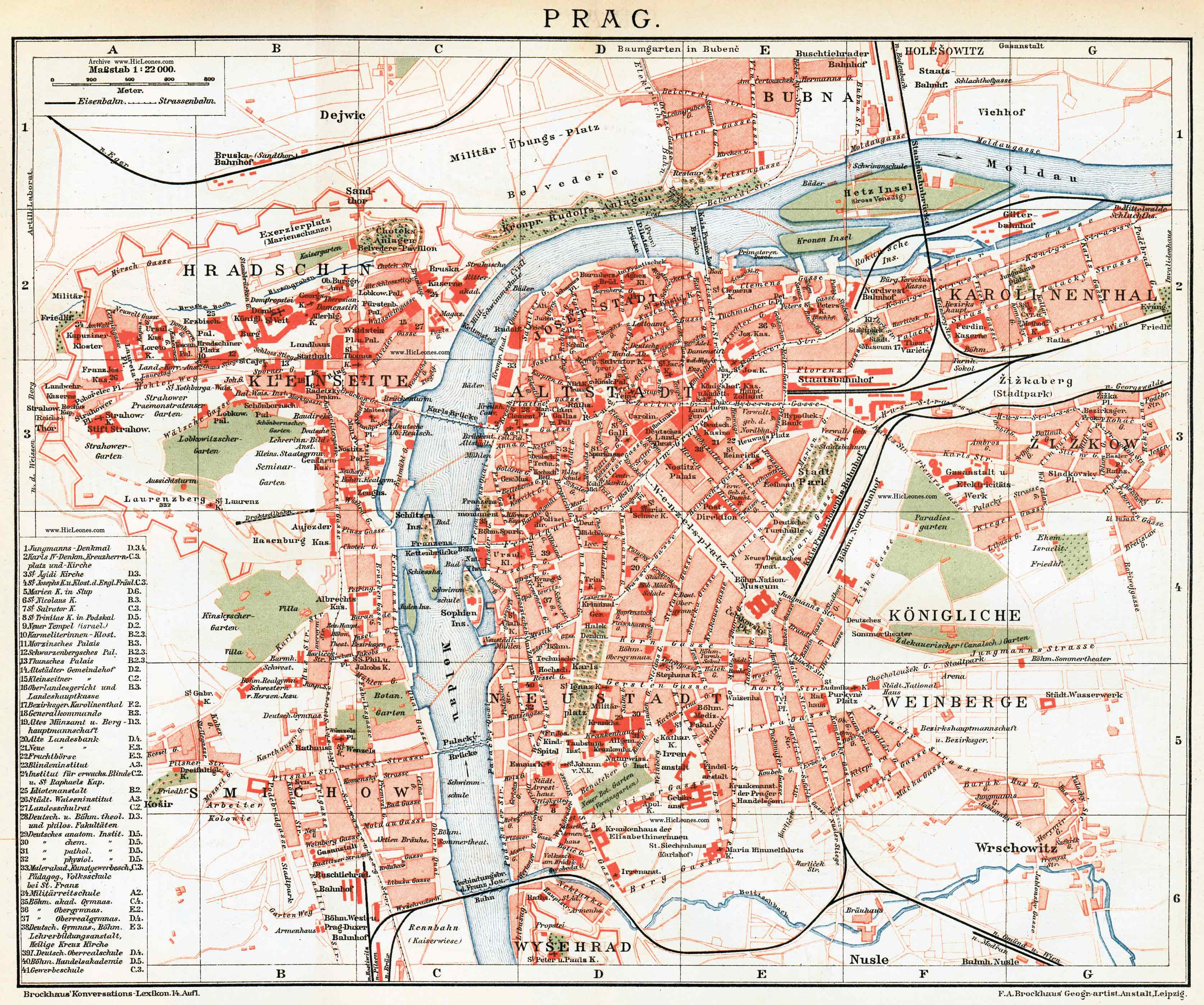 Stadtplan von Prag auf deutsch